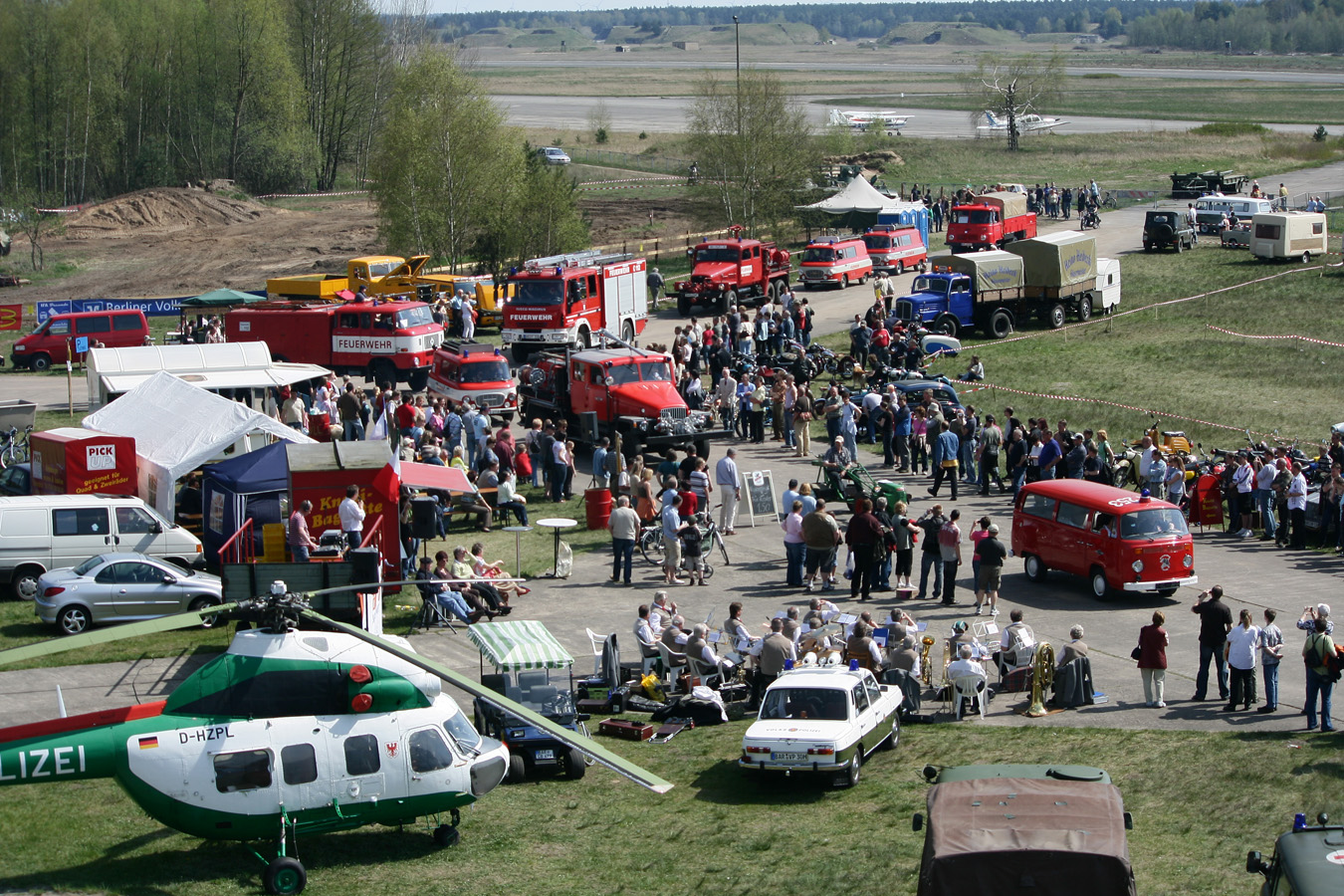 Ein Mil Mi-2 Polizeihubschrauber vor einer großen Menschenmasse beim Ostfahrzeugtreffen im Luftfahrtmuseum Finowfurt